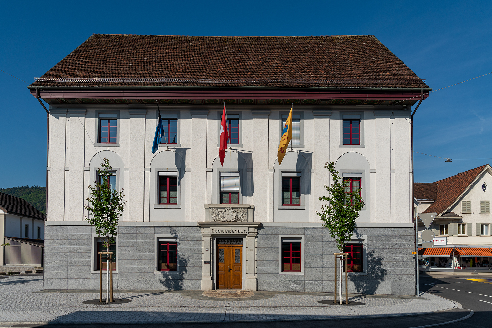 Ehemaliges Kauf- und später Schulhaus, heute Gemeindehaus in Reinach (AG)